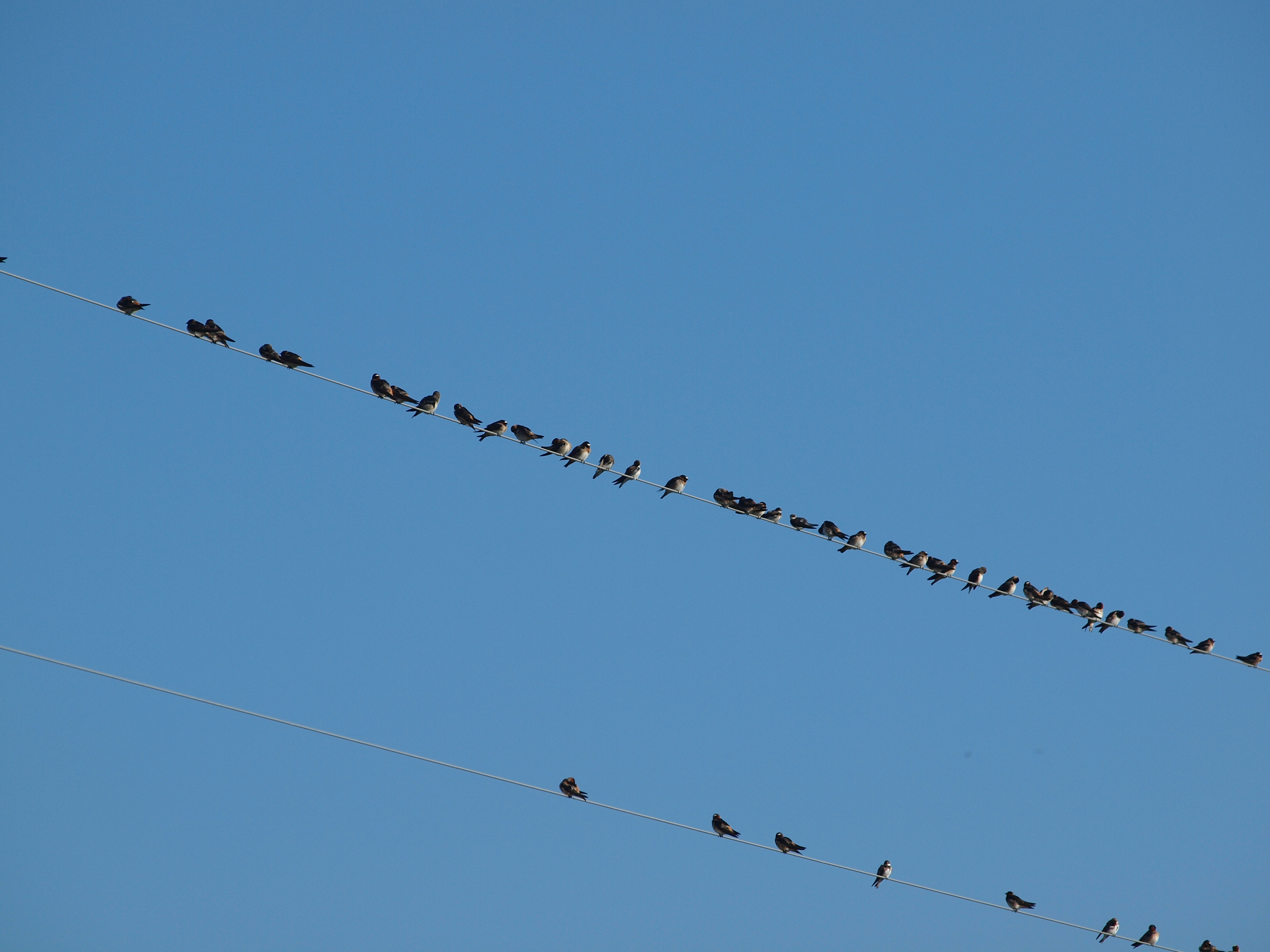 2012:05:08 07:50:10 (p5082918)